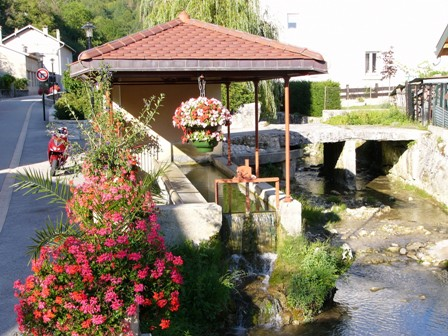 Ancien lavoir à Arbent